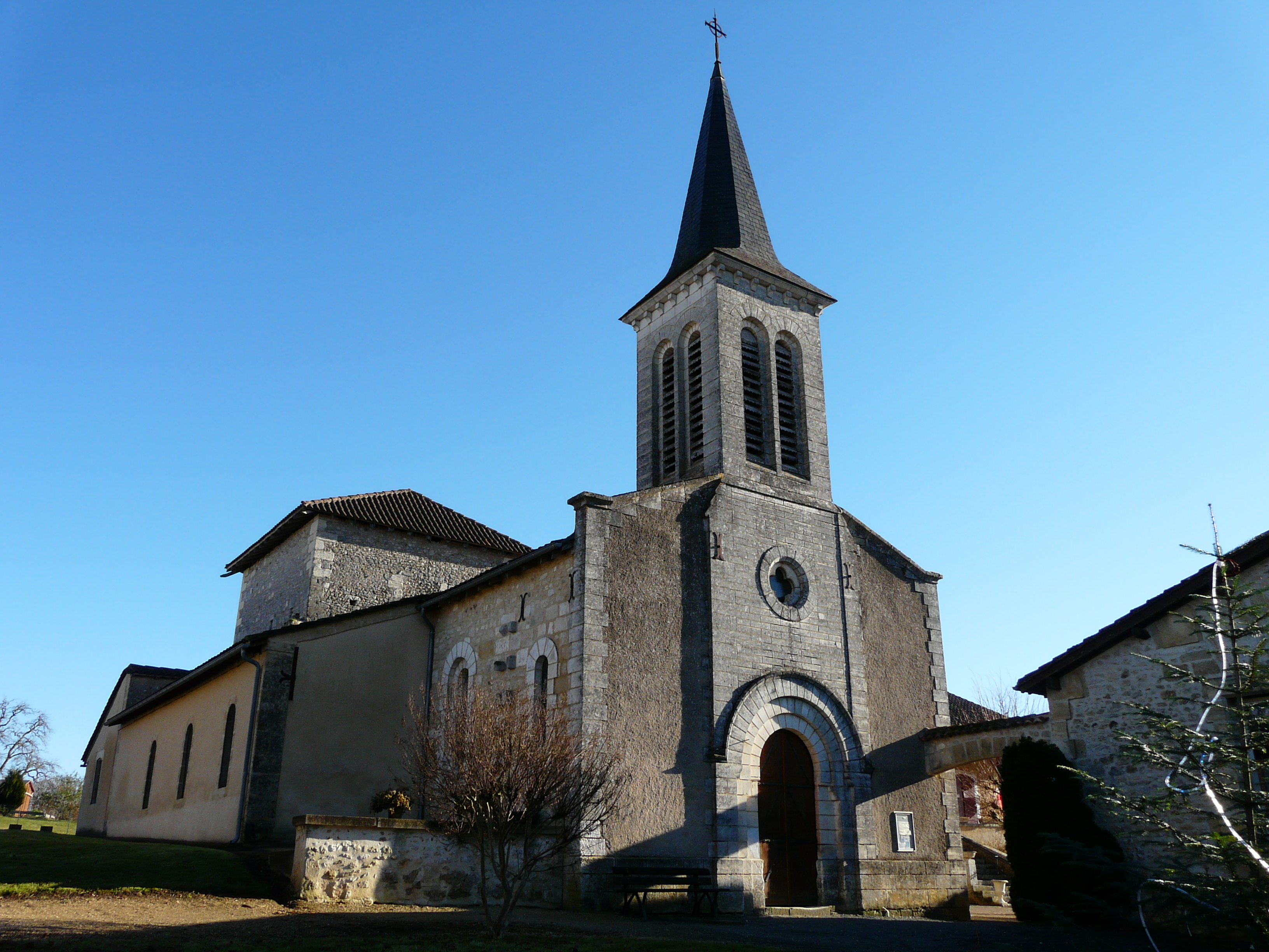 L'église Sainte-Catherine vue depuis le nord-ouest, Blis-et-Born, Dordogne, France.